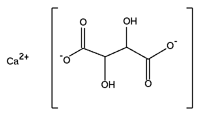 Calcium tartrate